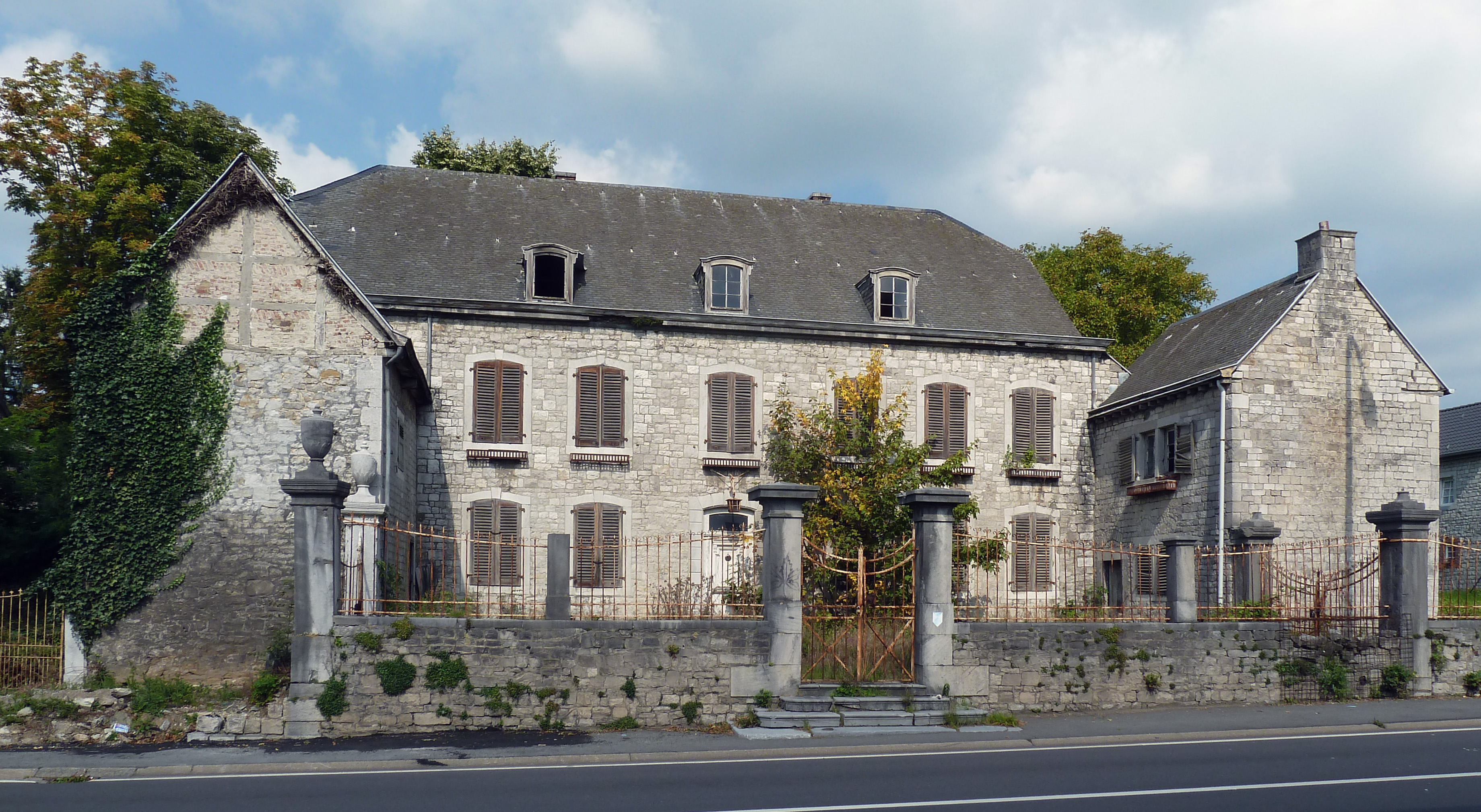 Eupener Strasse 8, Eynatten, Raeren, België